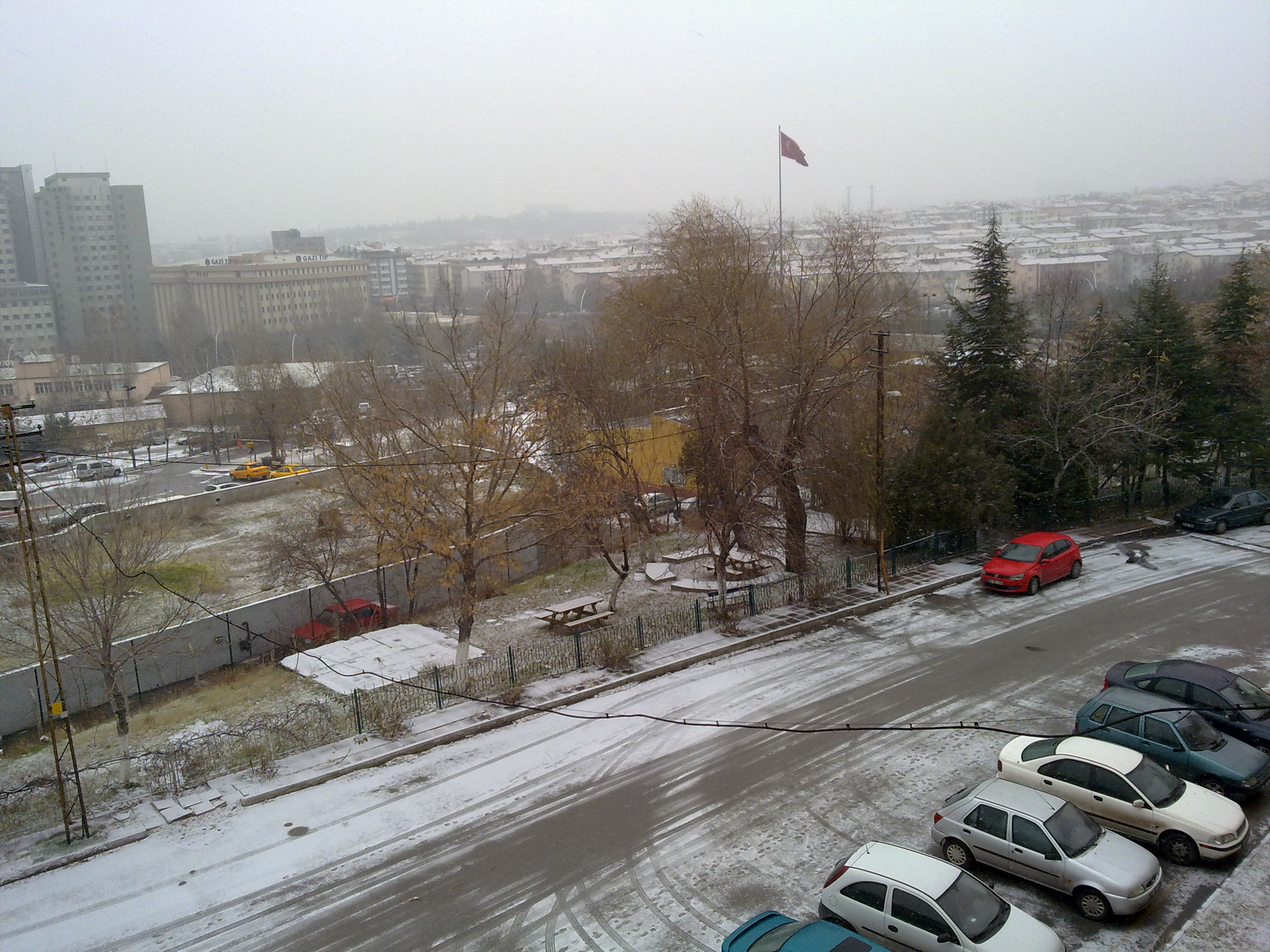 AAAL A Blok'tan Ankara